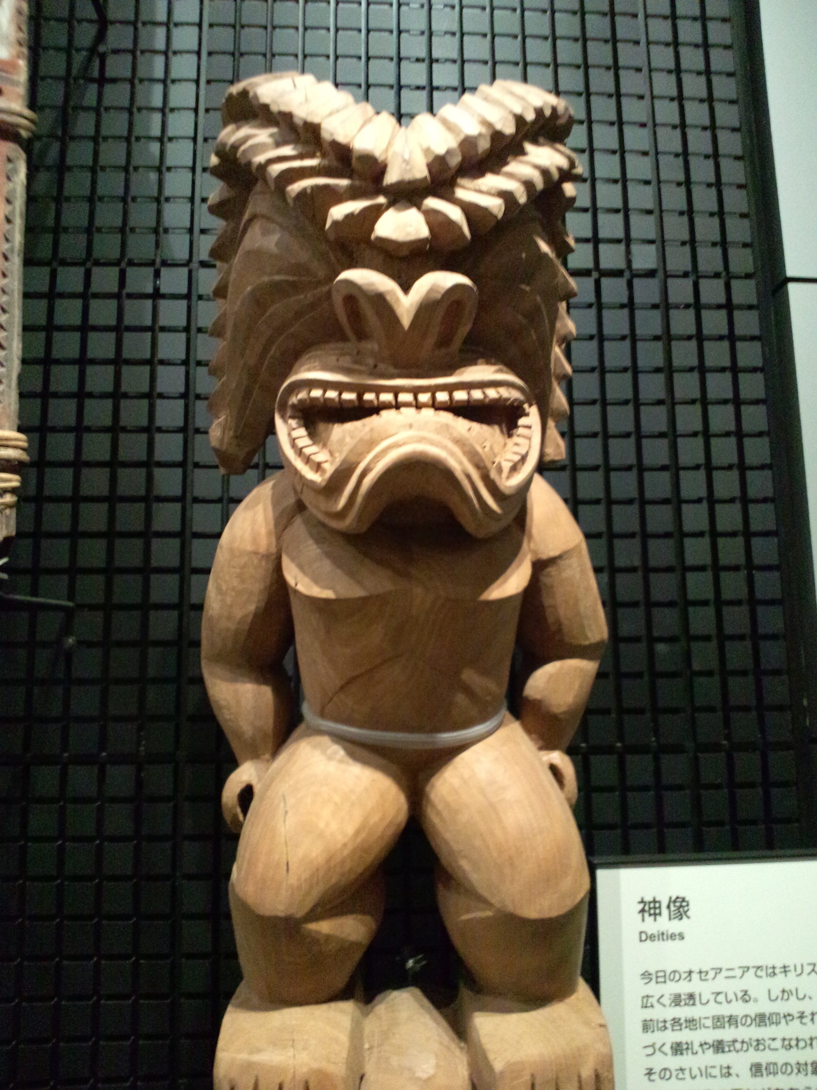 国立民族学博物館（大阪） 戦闘神クー像（アメリカ合衆国、ハワイ諸島）